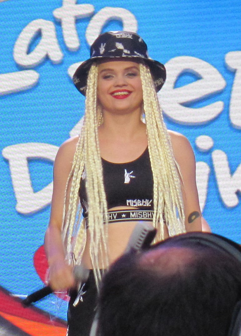 Koncert Lato Zet i Dwojki 2014 w Toruniu